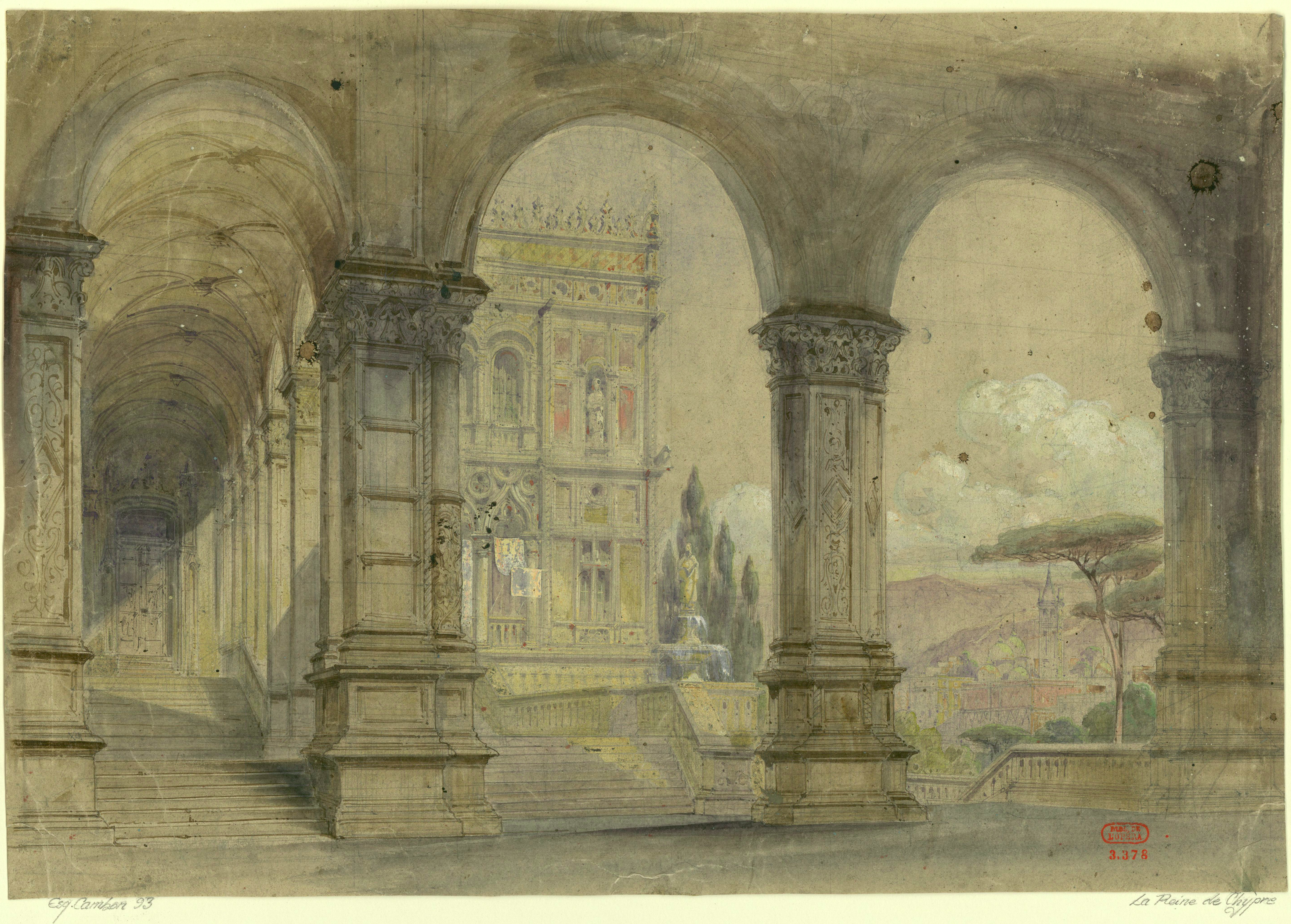 La reine de Chypre : esquisse de décor de l'acte I / Charles Cambon